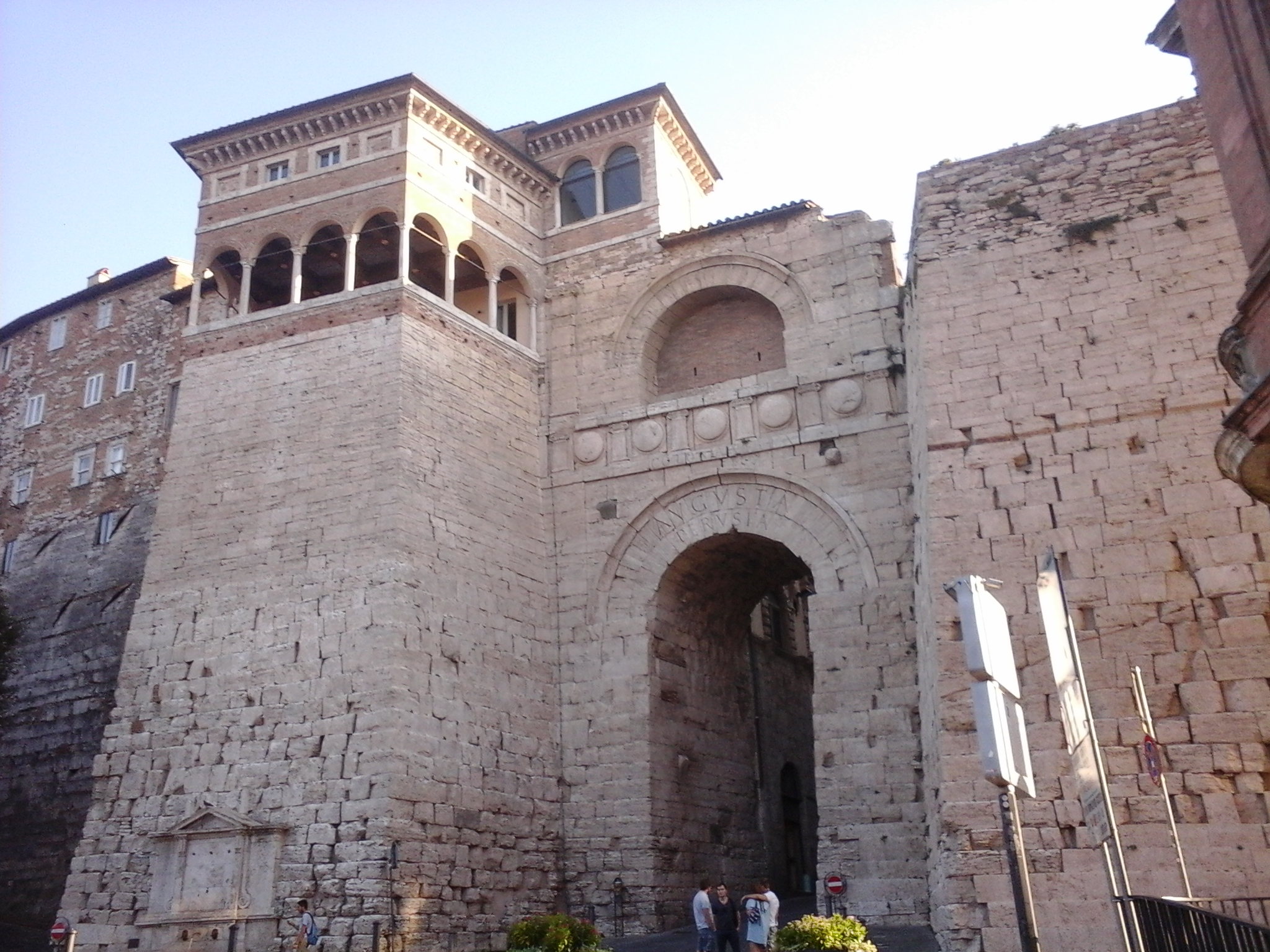 Arco Etrusco 2016